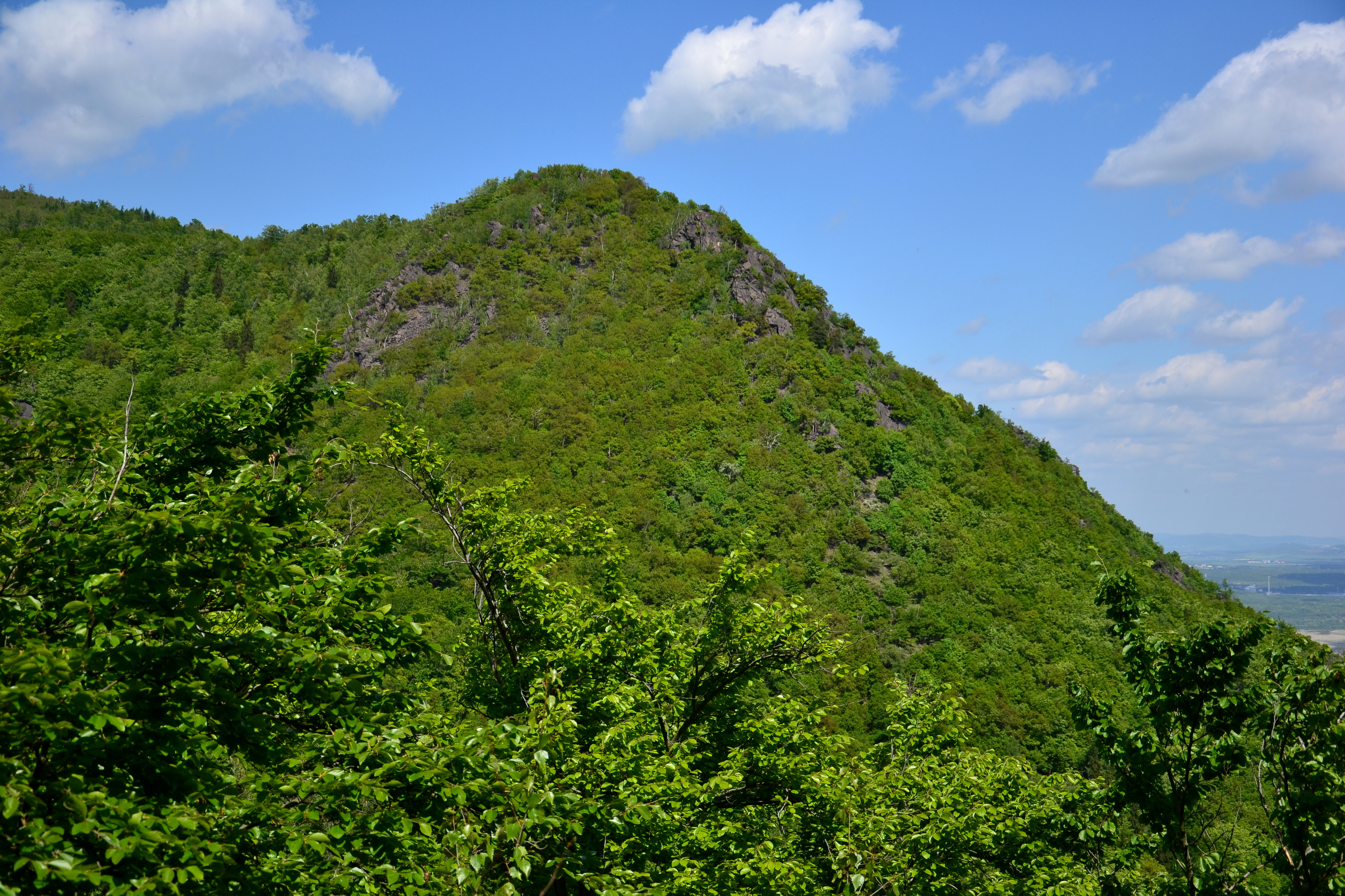 NPR Jezerka z Tereziny vyhlídky